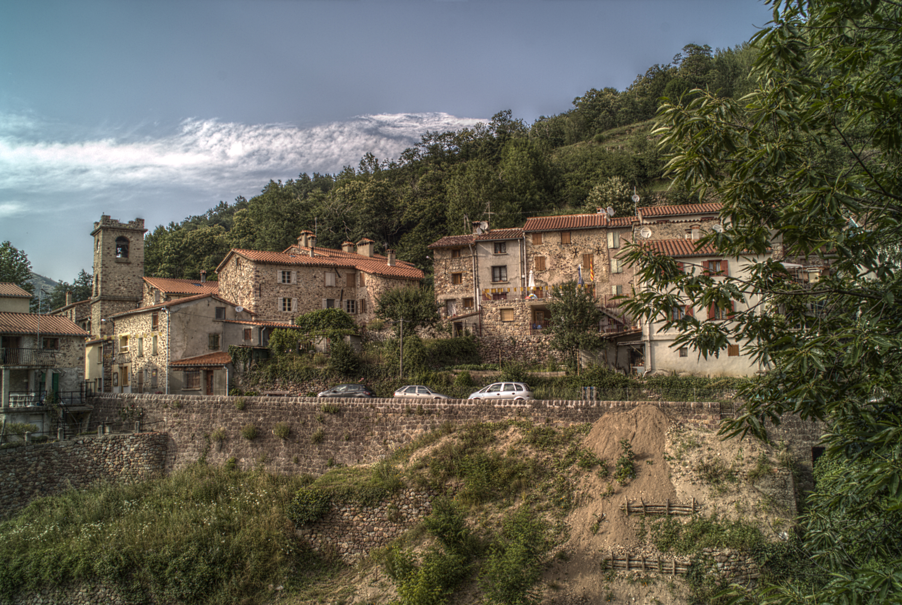 Vue générale, Lamanère (Pyrénées-Orientales, Languedoc-Roussillon, France)